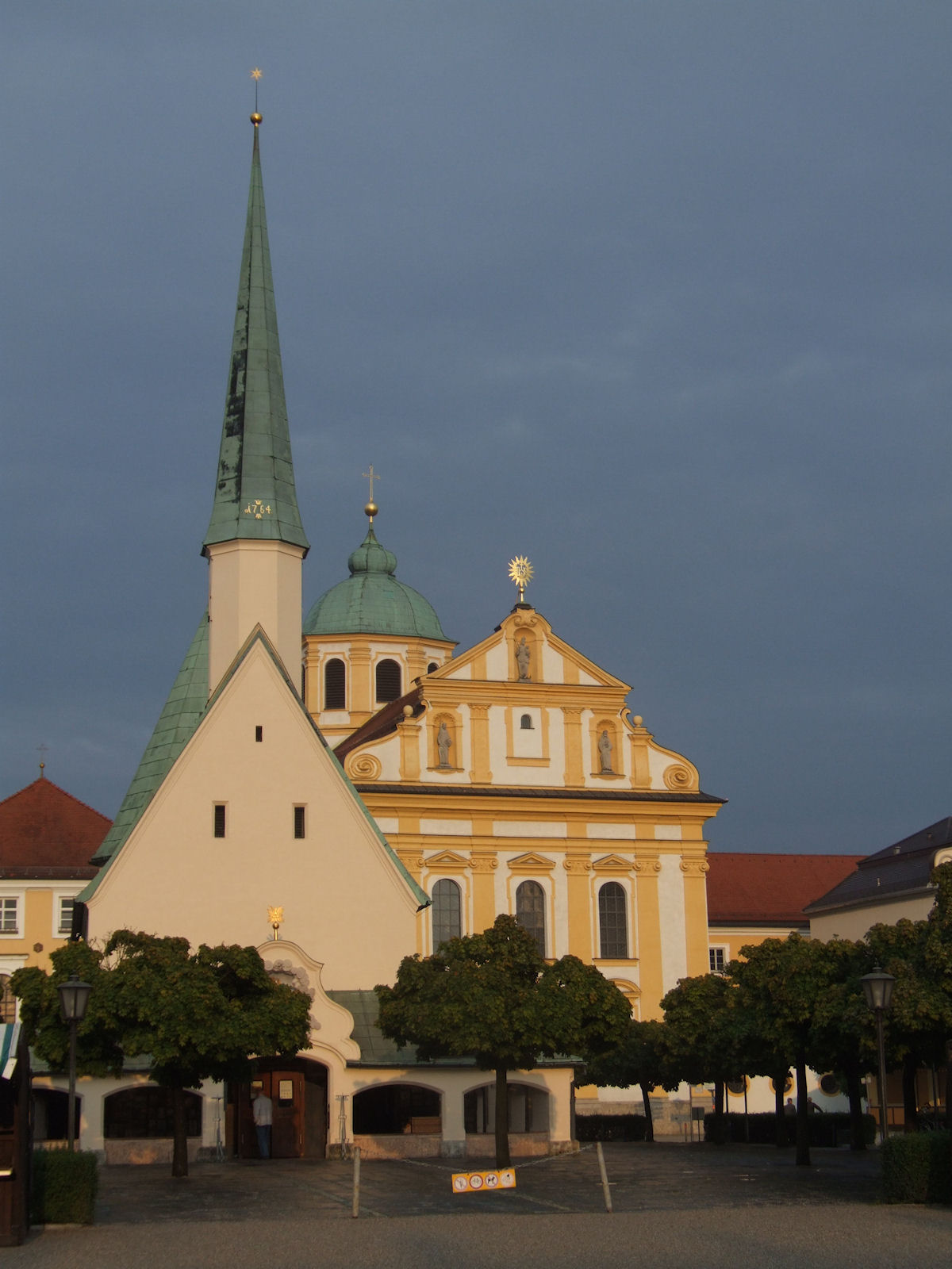 Gnadenkapelle, Altötting, Bavaria, Germany